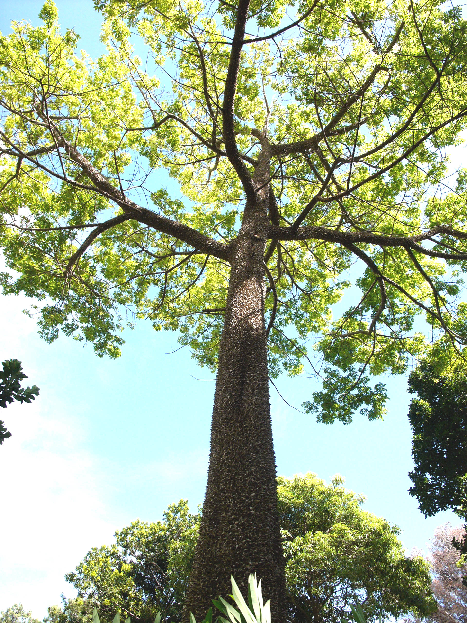 Kapok tree (Ceiba pentandra) on Madeira, Portugal